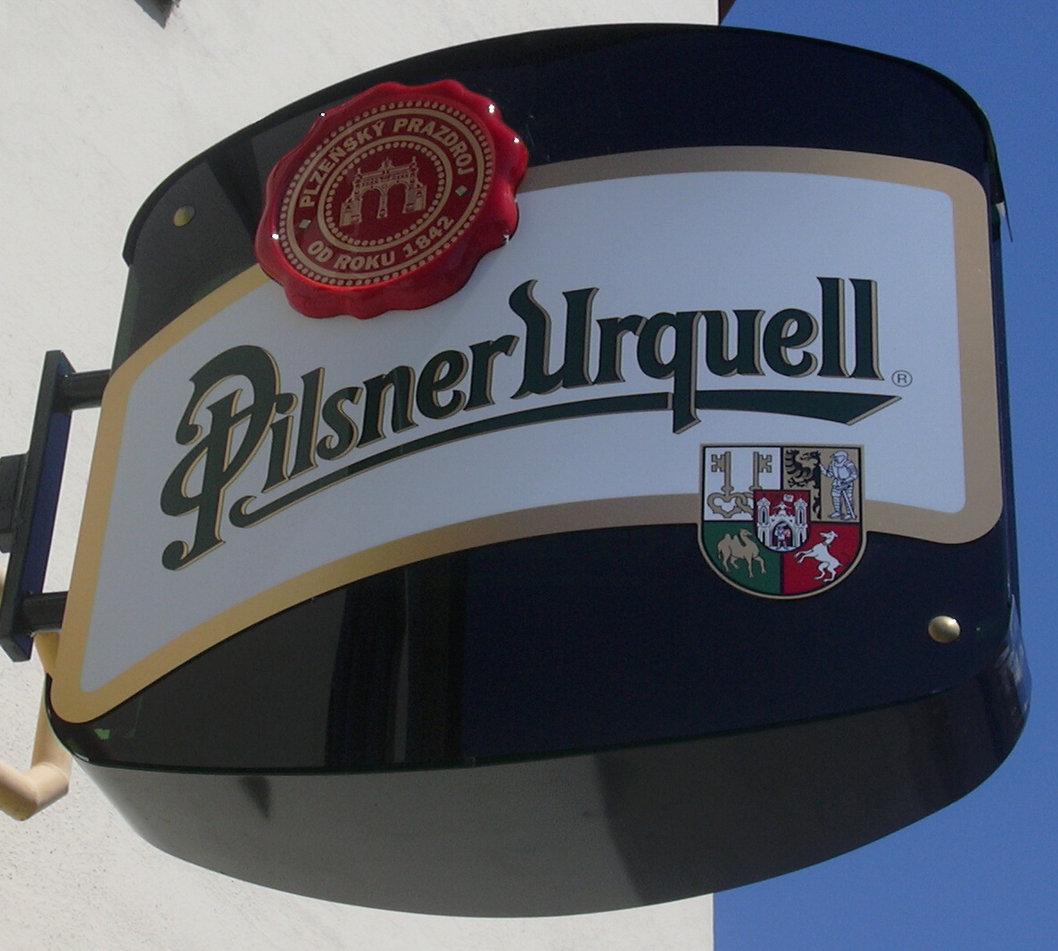 Pilsner Urquell logo(Beer- czech republic)